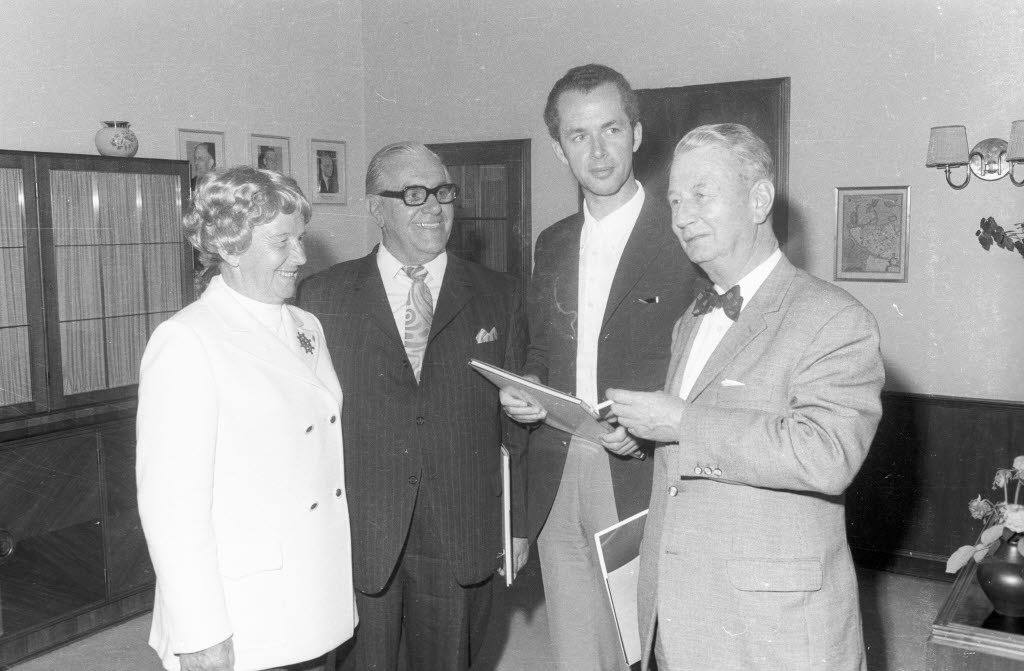 Stadtpräsidentin Ida Hinz überreicht in ihrem Amtszimmer ihren Gästen, den Stadtpräsidenten der kreisfreien Städte Schleswig-Holsteins, das Kieler Olympiabuch. V.r. August Heine (Lübeck), Arthur Thomsen (Flensburg) und Walter Jansen (Neumünster).